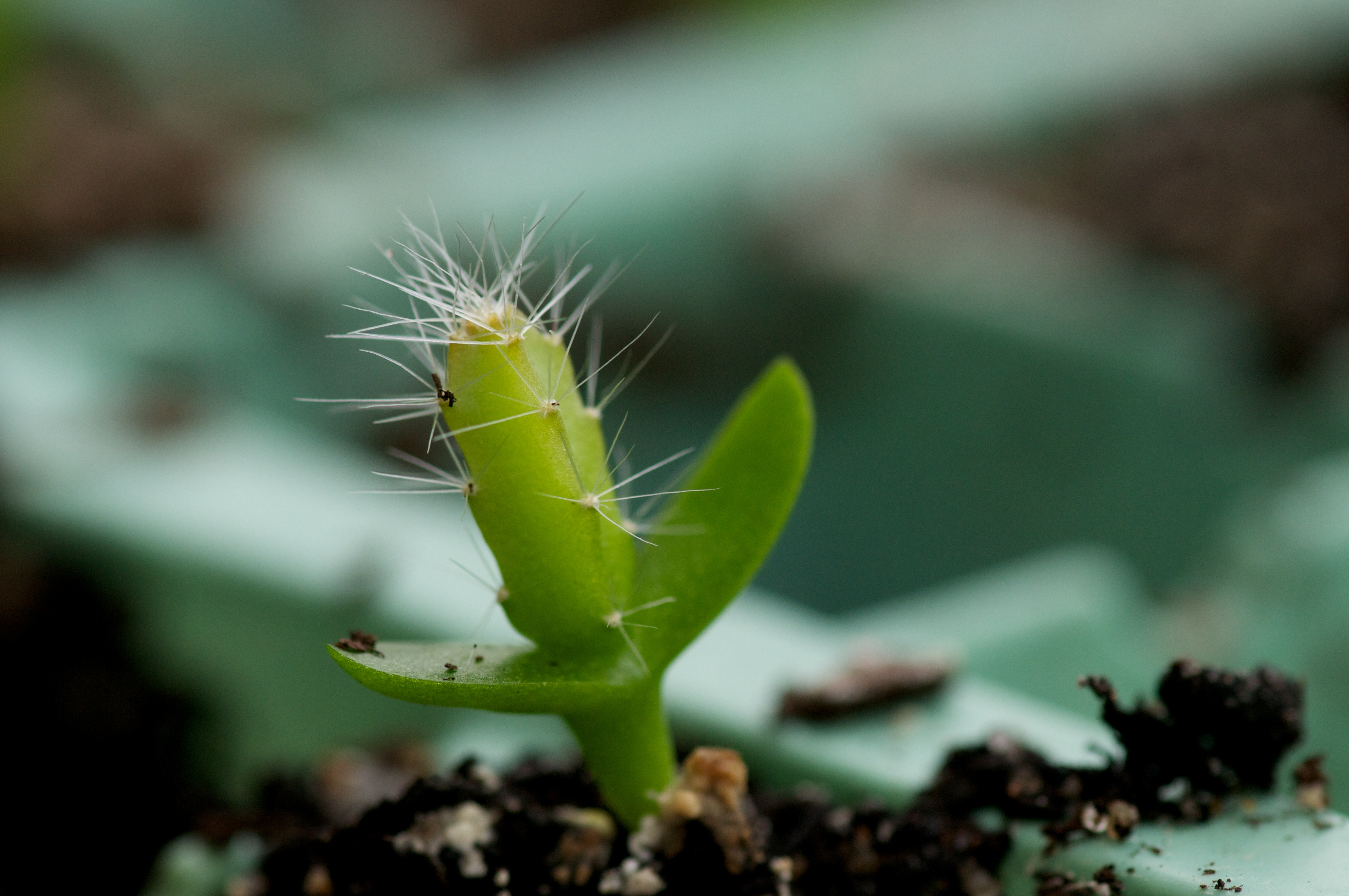 Pitaya Cactus - Seedling